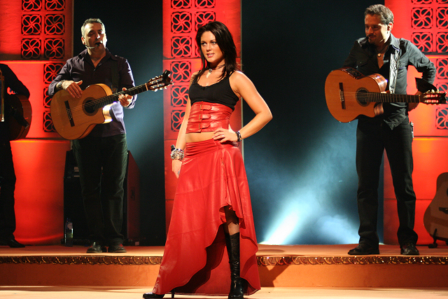 Belle Perez tijdens een concert in het Beatrix Theater in 2008